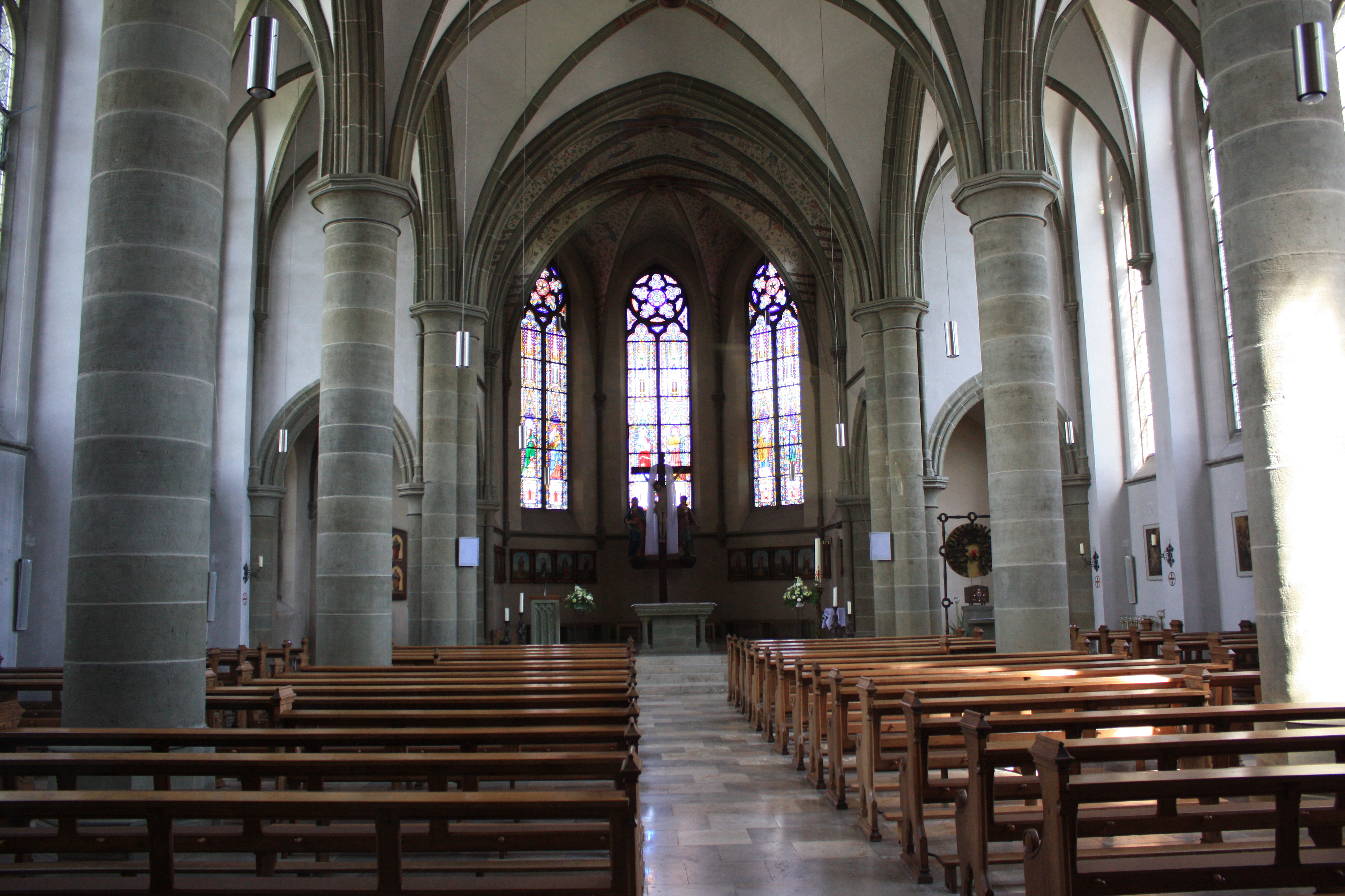 Blick nach Osten in der St. Johannes Baptist-Kirche in Rüthen